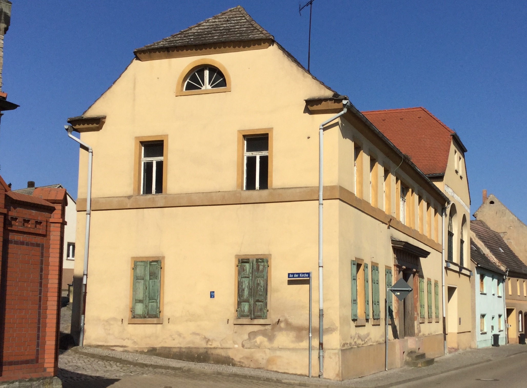 Haus Mühlenstraße 1 in Alsleben